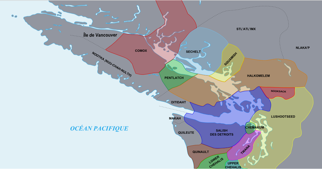 Sujet : Carte des populations salish de la côte (Coast Salish) en Colombie-Britannique au Canada et dans l'état de Washington aux États-Unis Format : PNG Fond de carte : Origine des données : site FTP de SWBD (SRTM Water Body Dataset) du SRTM (Shuttle Radar Topography Mission) de la NASA Visualisation : logiciel dlgv32 Pro (version allégée de Global Mapper 9) de l'USGS Projection : données non transformées. Logiciels de dessin utilisés : Inkscape pour la vectorisation des contours et l'ajout des légendes Carte réalisée en s'appuyant sur un didactiel de Sting Données liées aux population : Origine des données : Synthèse de plusieurs cartes disponibles sur Internet, dont : University of Ottawa, Saint Paul University (Ottawa, Ont.), Laurentian University of Sudbury, Wilfrid Laurier University, and Canadian Anthropology Society. Anthropologica. Waterloo, Ont. [etc.]: Wilfrid Laurier University Press [etc.], 1955. Page 51. Ouvrage consultable en ligne avec la permission de l'éditeur sur le site web Google Books. Logiciel de dessin utilisé : Inkscape